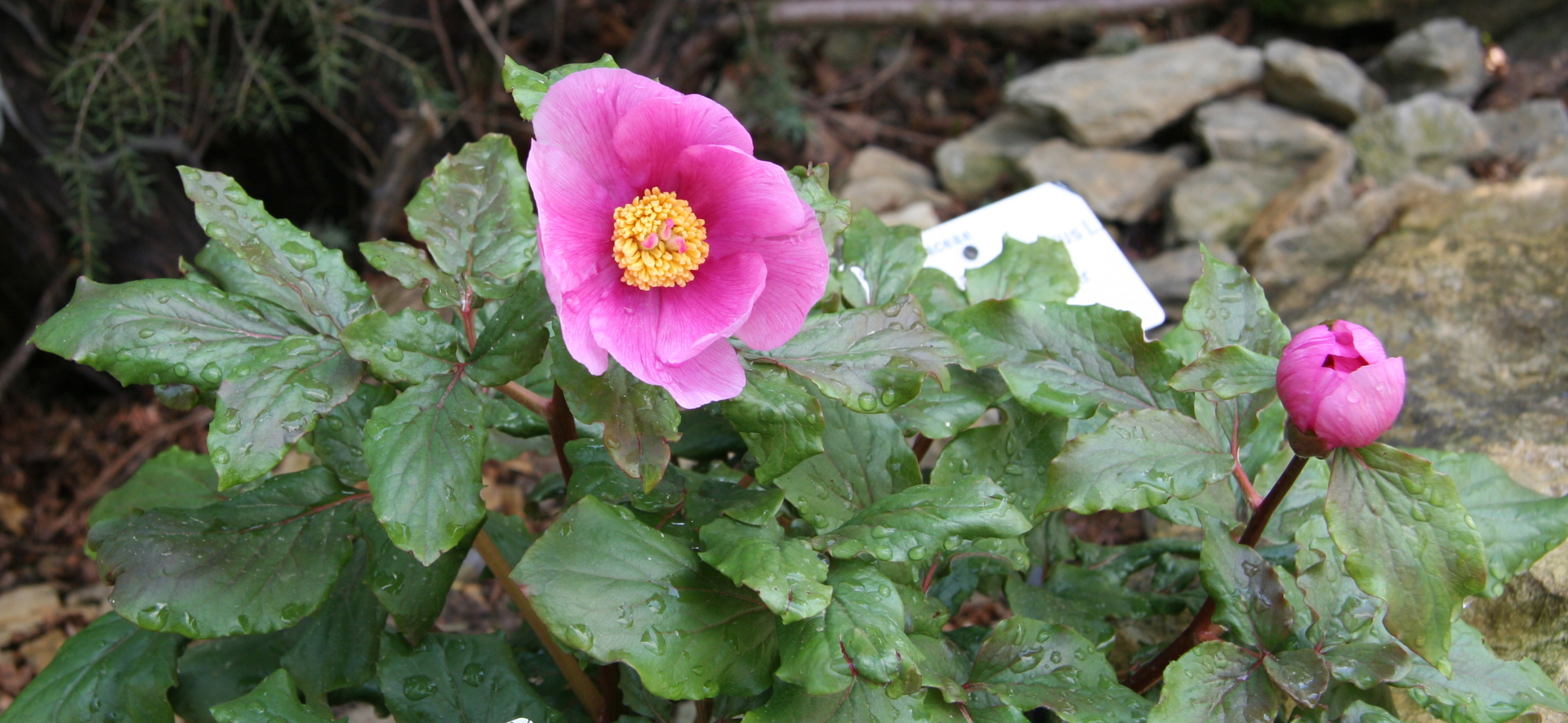 Paeonia corsica (as Paeonia mascula ssp. russoi) in Botanischen Garten Dresden